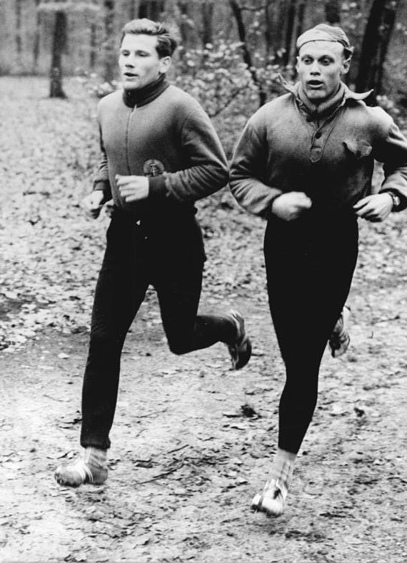 Herrmann Buhl, Siegfried Valentin Zentralbild Kohls Sd. 1.3.1961 Für die diesjährige Saison bereiten sich die Leichtathleten des ASK Vorwärts Berlin sehr intensiv vor. Täglich trainieren sie nach ihrem Dienst etwa zwei Stunden. Lockerungsübungen und Tempoläufe stehen auf dem Programm, wenn sich die Mittel- und Langstreckenläufer in der Pirschheide Potsdam zum Training einfinden. Nach dem internationalen Leichtathletiksportfest des SC Dynamo Berlin haben die Berliner bereits am 5. märz Gelegenheit, die ASK-Leichtathleten beim internationalen Armee-Frühjahrscross "Rund um den Friedrichshain" wiederzusehen. UBz: Herrmann Buhl (links) und Siegfried Valentin beim Waldlauf.